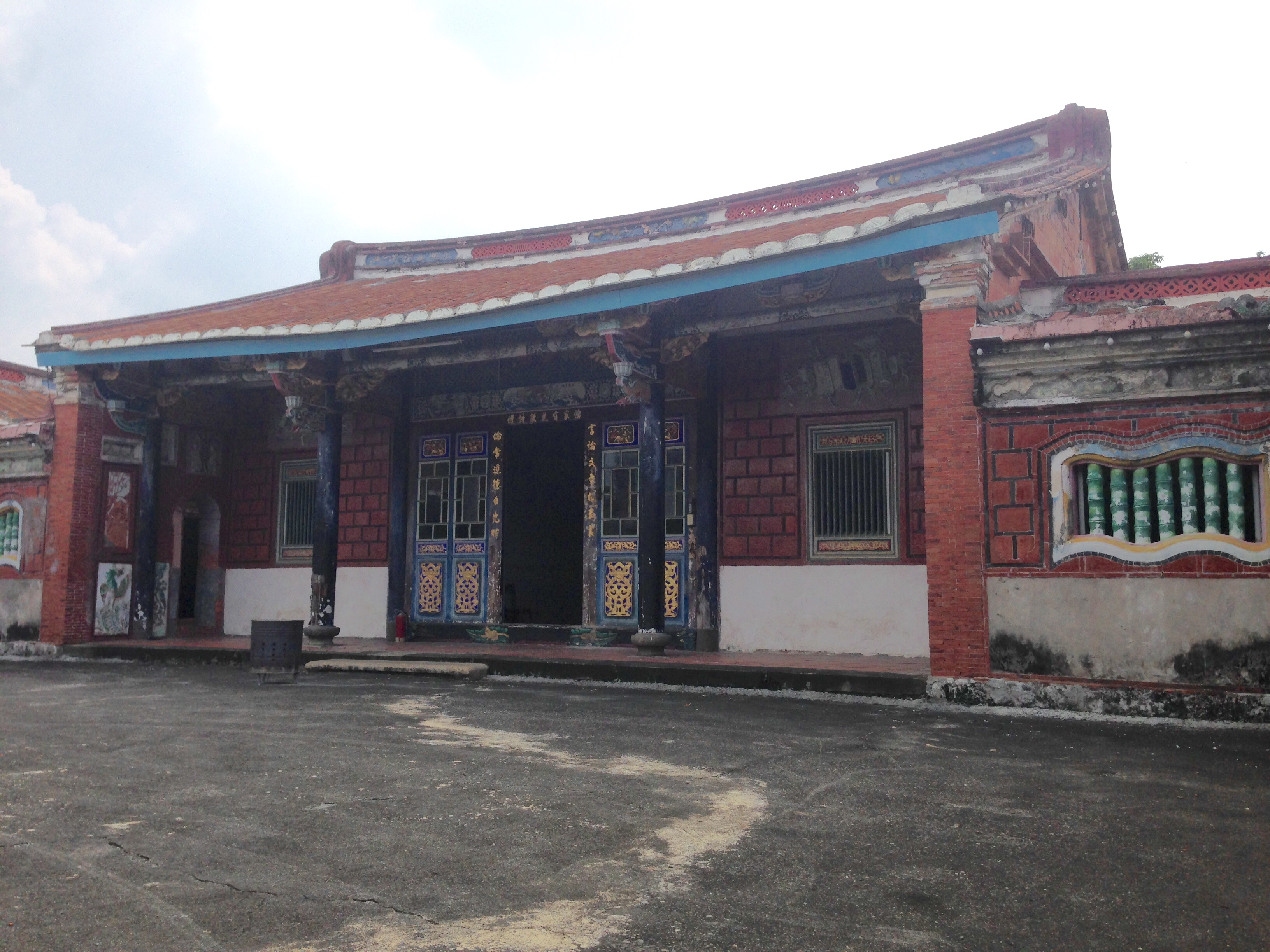 龔家武陵堂